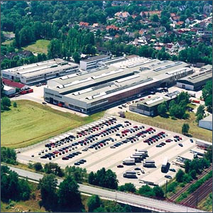 Firmengelände von DESMA in Achim